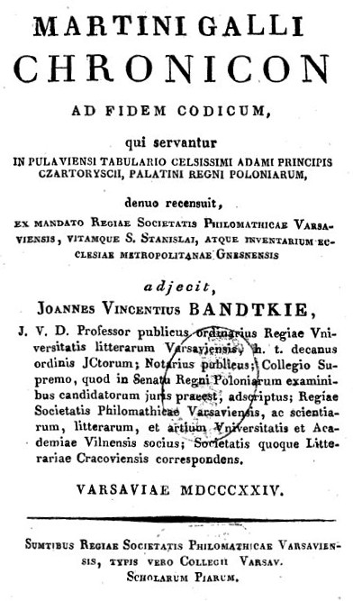 Gallus (Anonymus), Jan Wincenty Bandtkie Stężyński